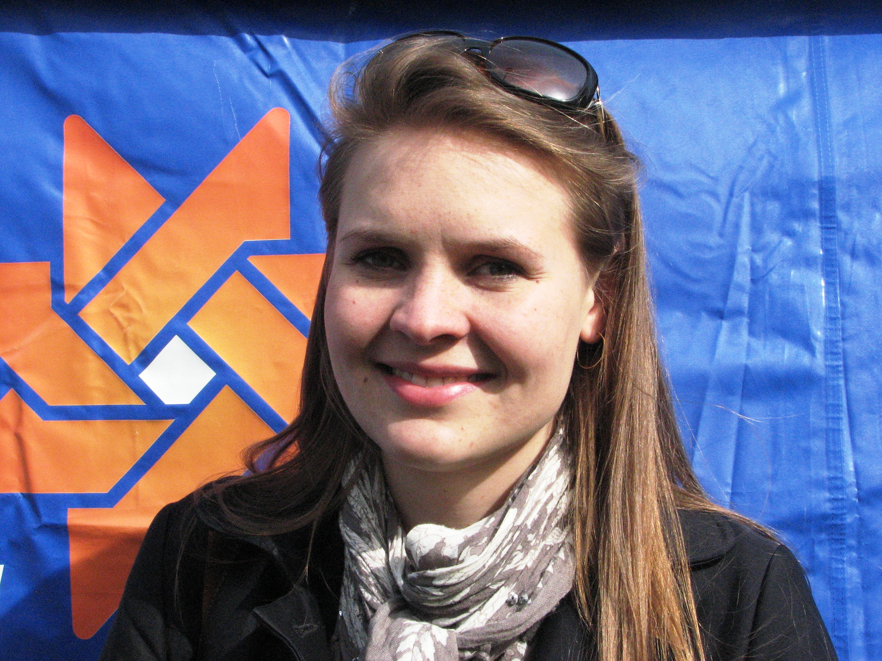 Linda Eichler Euroopa Parlamendi valimiste eel IRLi telgi juures